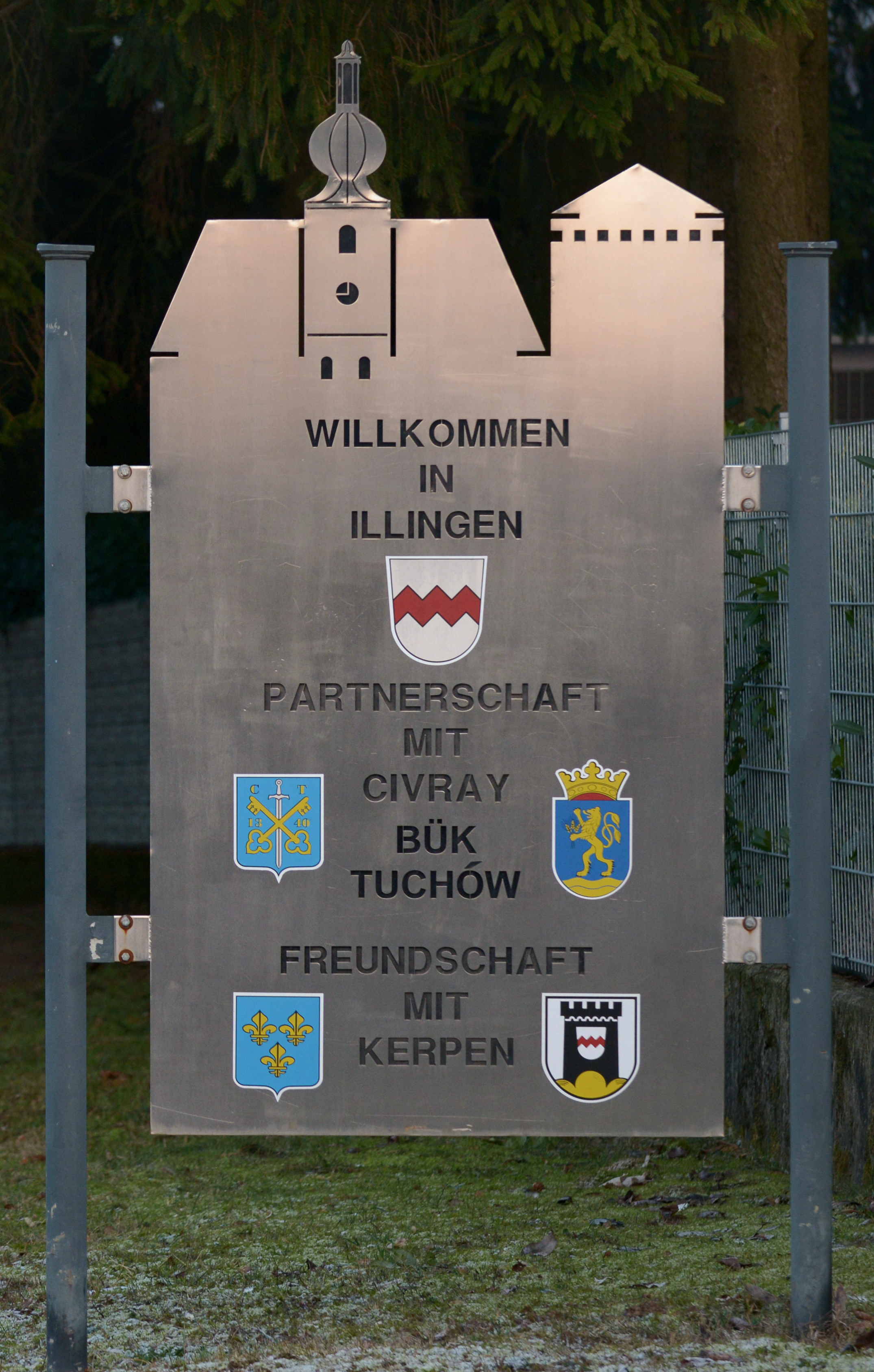 Informationstafel in Illingen über die Städtepartnerschaften der Gemeinde. Illingen, Saarland/ Deutschland (2019).